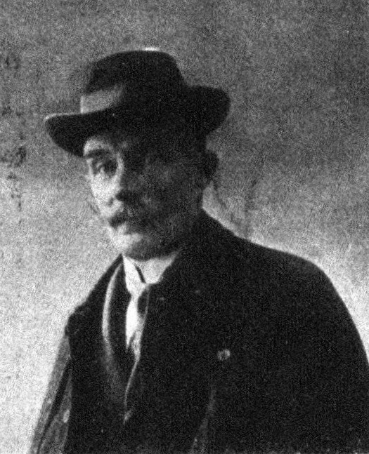 Österreichischer Politiker, Reichsratswahl 1907, Name siehe Dateiname